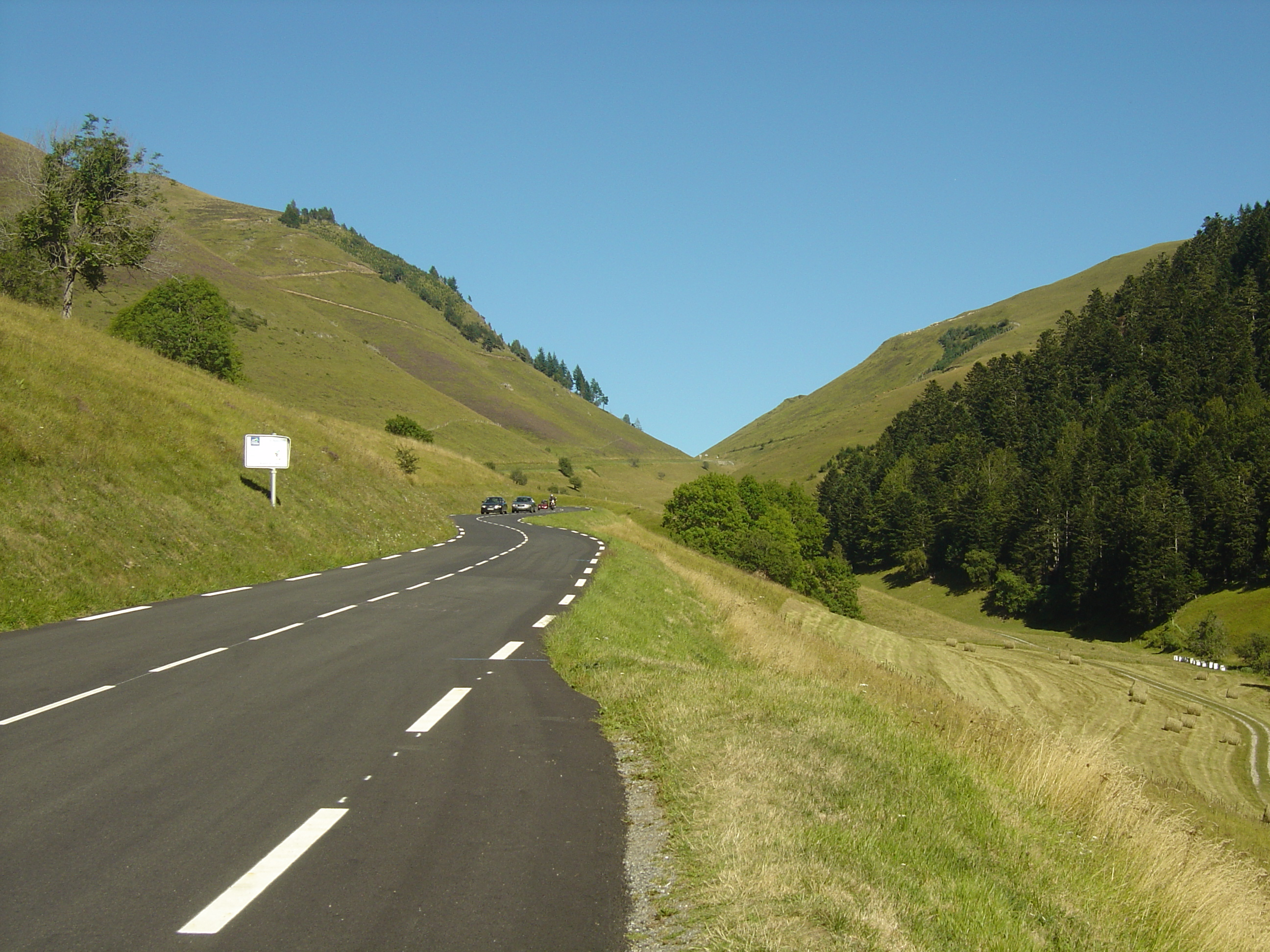 Ascension du col de Peyresourde par son versant nord-ouest (depuis Avajan). Un peu plus loin le panneau qui annonce les deux derniers kilomètres de l'ascension, à 8 % de moyenne